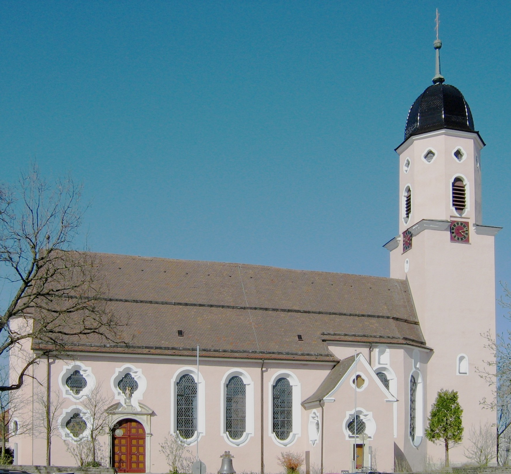 Sankt Martinskirche in Engstingen-Großengstingen, Germany